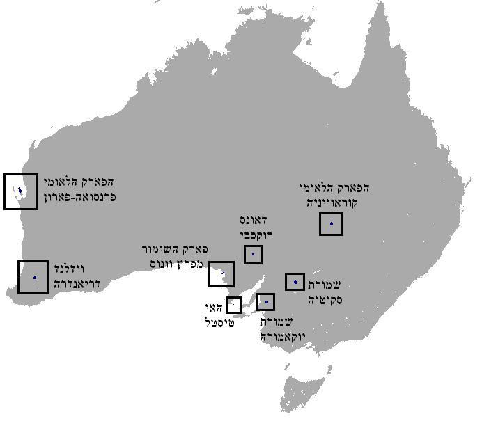 אזורי השבה של הבילבי הענק